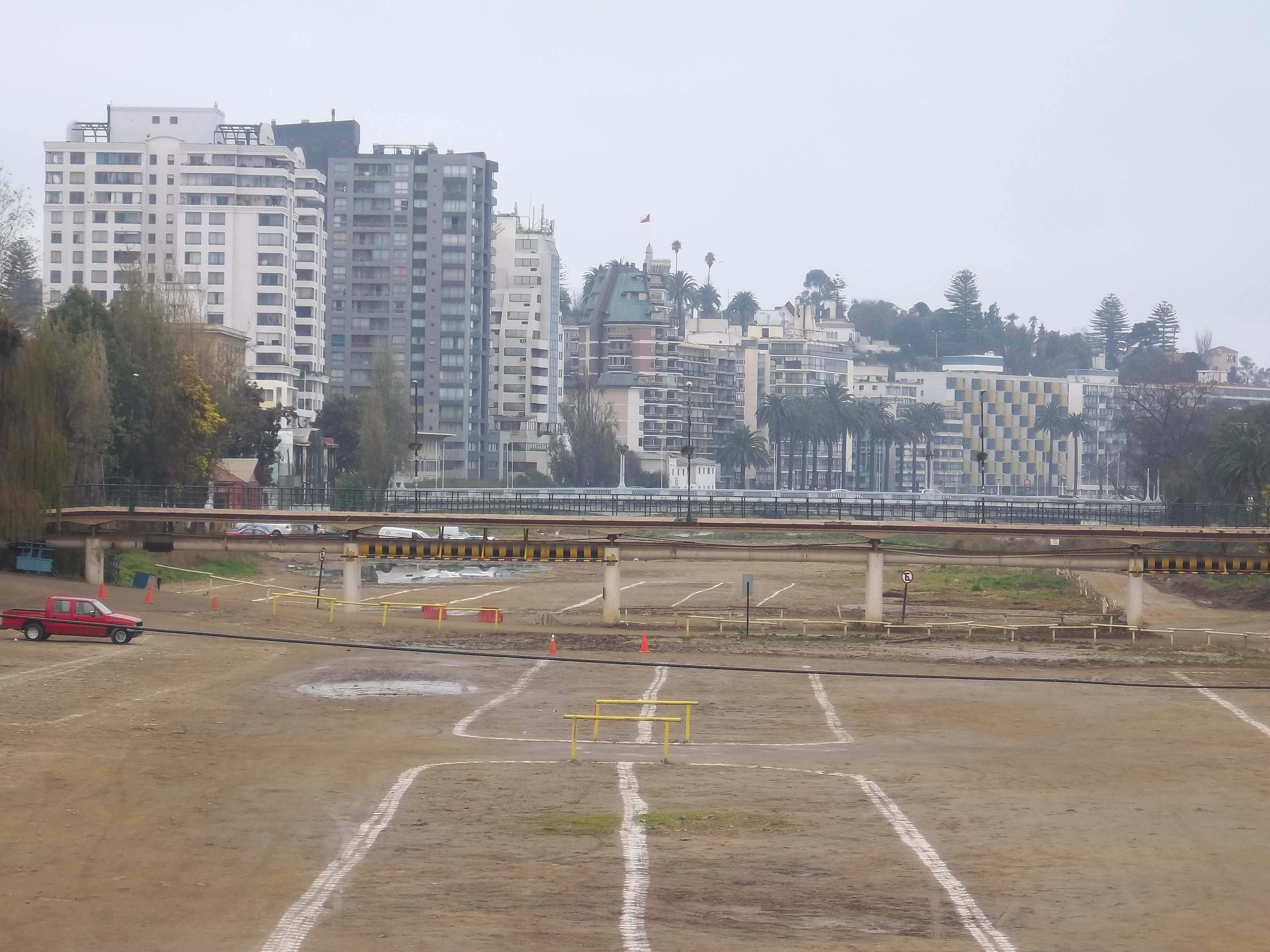 Puente Libertad sobre el Estero Marga Marga hacia el oeste en Viña del Mar, Regíón de Valparaíso, Chile.